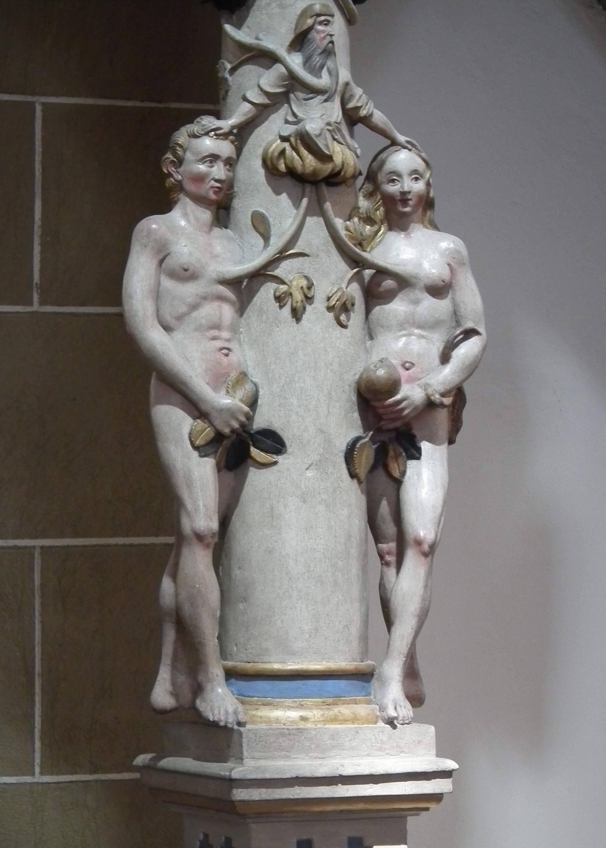 Kaufmannskirche Native nameKaufmannskircheLocationErfurt, GermanyCoordinates50° 58′ 40.64″ N, 11° 02′ 06.48″ E